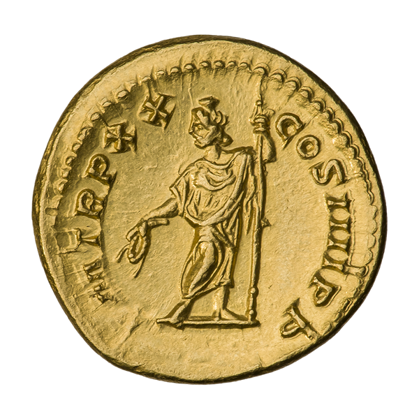 Ауреус. Каракалла. Ок. 217 г. (реверс). Надпись P M TR P XX COS IIII P P. Серапис (египетско-греческий бог подземного царства, а также бог-врачеватель) с модием (корзиной) на голове и венком в руке стоит, опираясь на длинный скипетр.